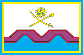 Прапор Могилів-Подільського району